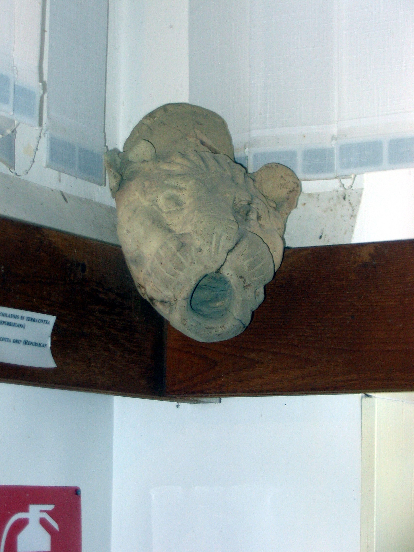 Museo di Cosa - Ansedonia - Orbetello - Toscana - Italia